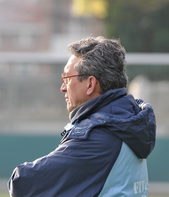 André Wetzel, de hoofdtrainer. 'ADO degradeert niet ', hield hij ons allen voor in december 2008. Krijgt steeds meer kritiek van de supporters. Een echte Hagenaar, een heer.